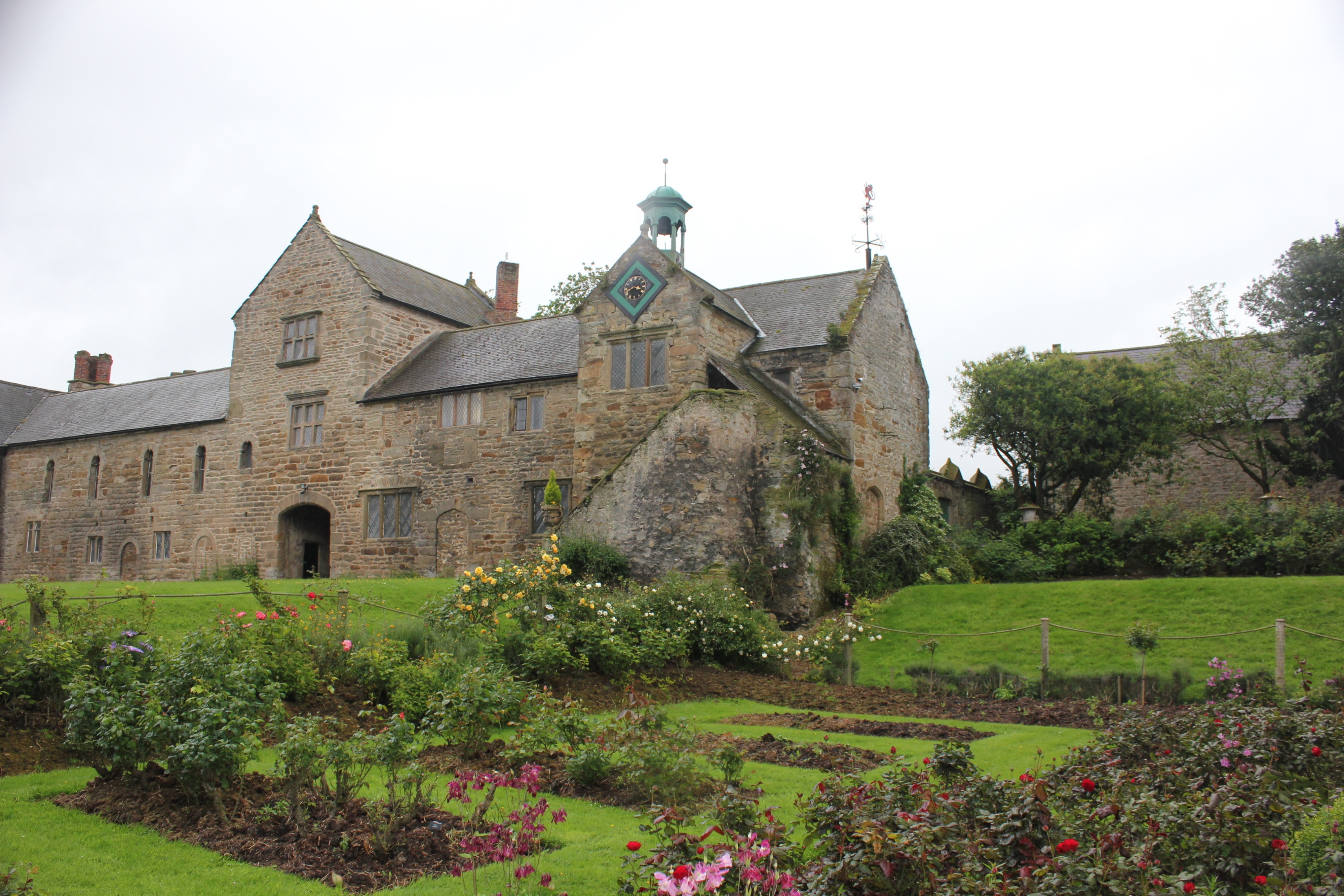 Mostyn Hall